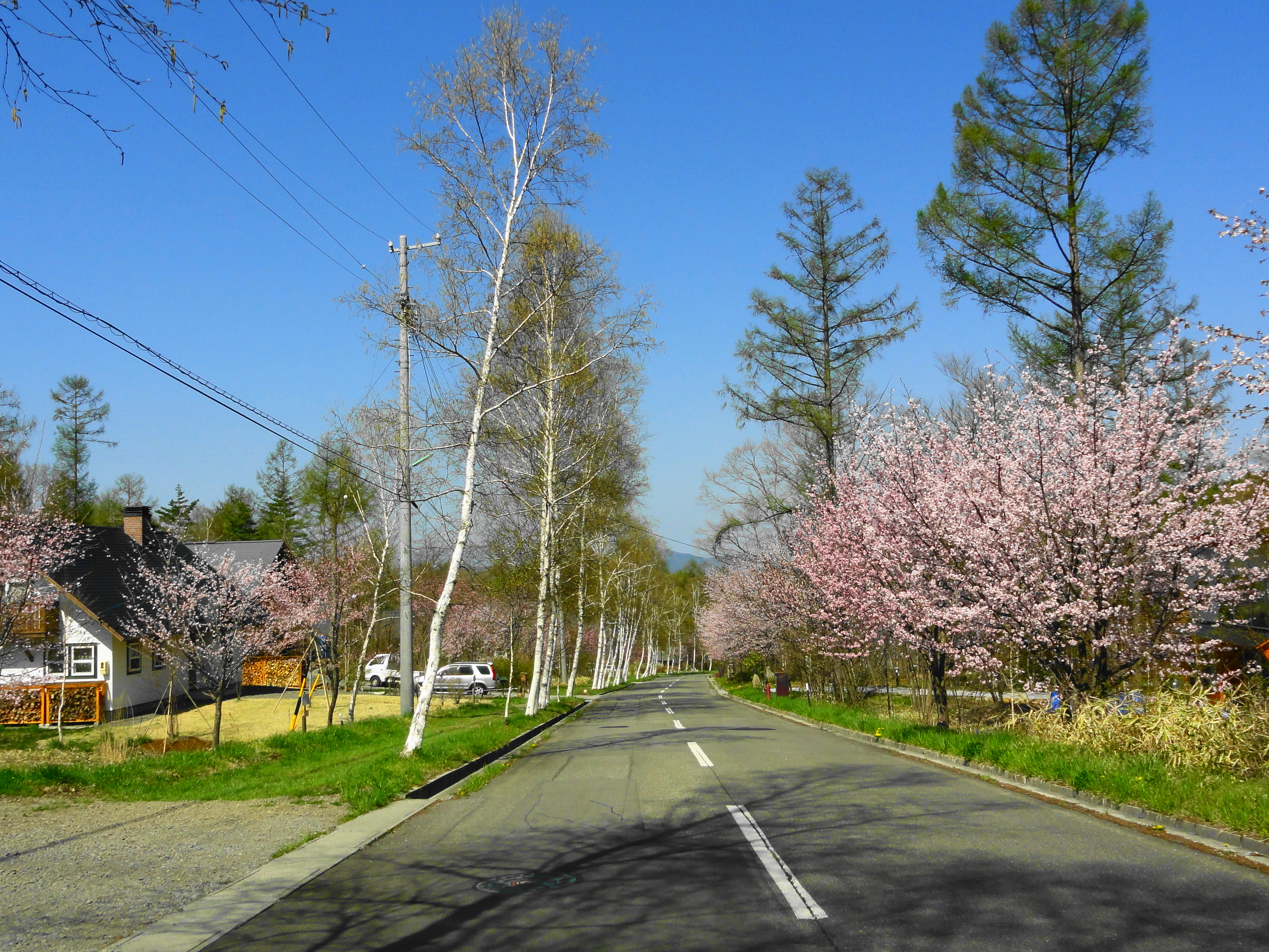 八ヶ岳 原村 白樺と桜